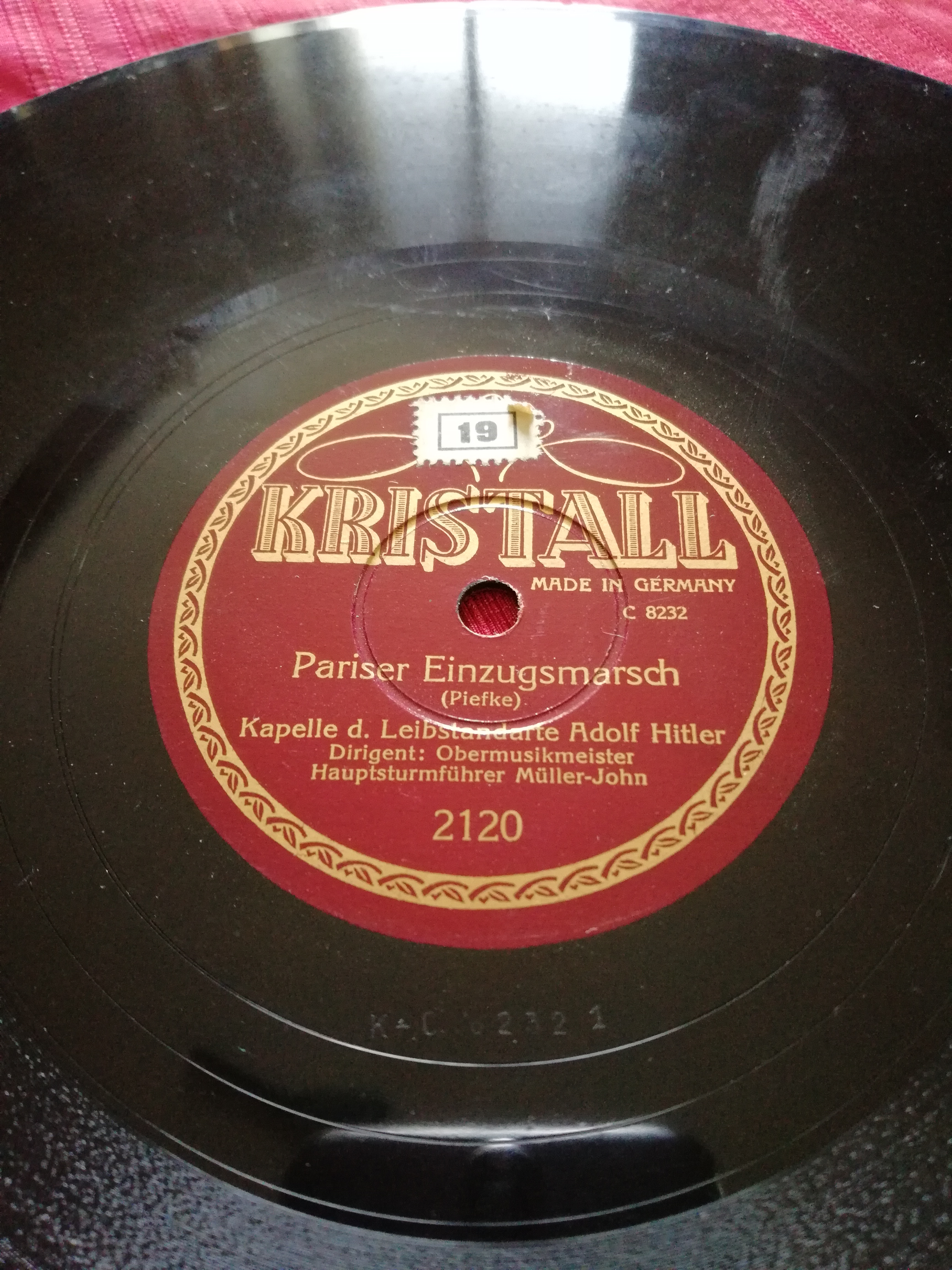 Gemeinschaftliche Fotodokumentation von Joachim Giesel im Team mit Bernd Schwabe im Atelier in der Plathnerstraße im Zooviertel von Hannover, hier eine Schellackplatte der Firma Kristall-Schallplatten G.m.b.H zur Zeit des Nationalsozialismus, Nummer C 8232 und Nummer 2120, Titel „Pariser Einzugsmarsch (Piefke) Kapelle d. Leibstandarte Adolf Hitler Dirigent: Obermusikmeister Hauptsturmführer John“ ...